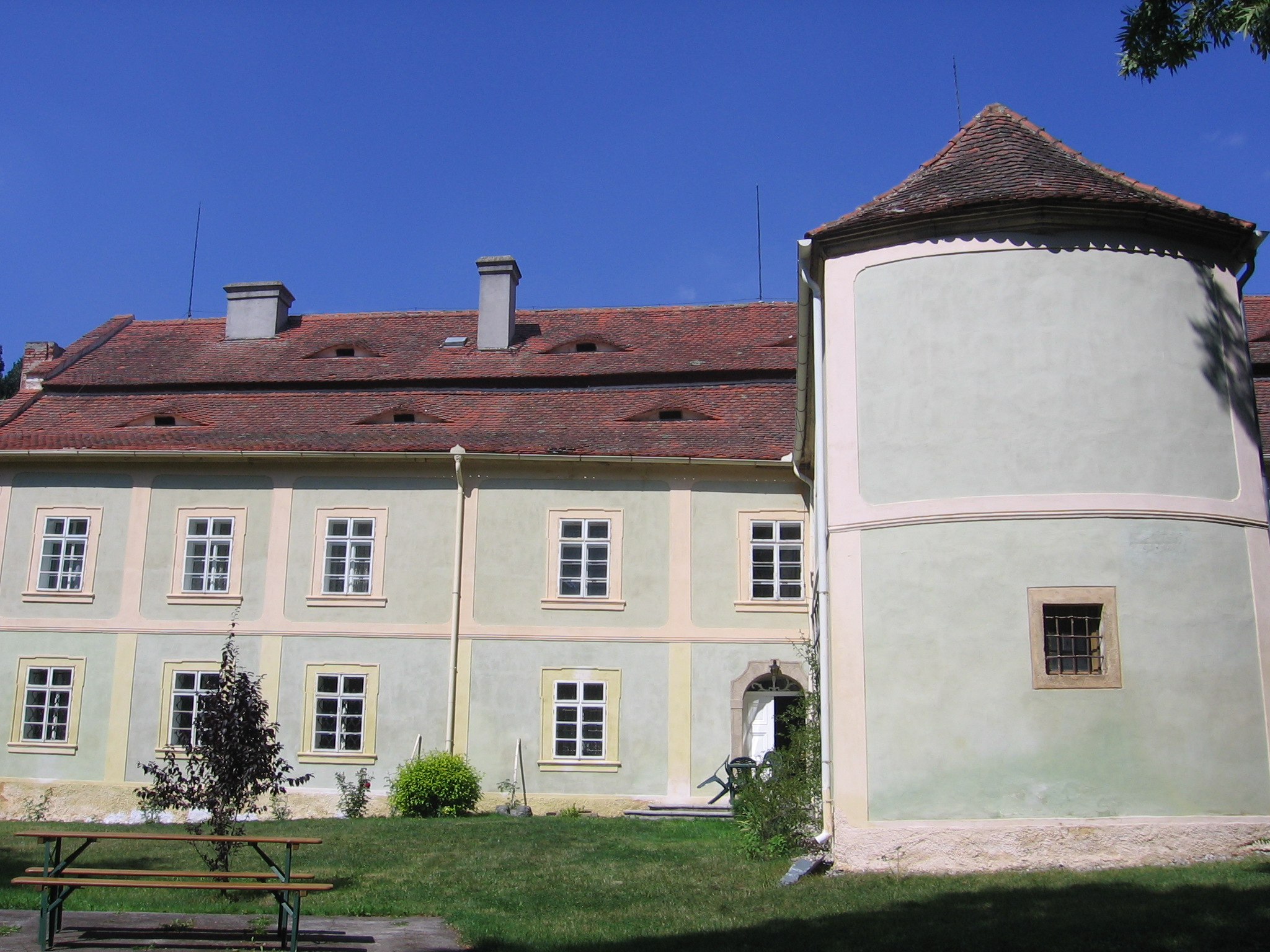 Zámek Luhov, okres Plzeň-sever